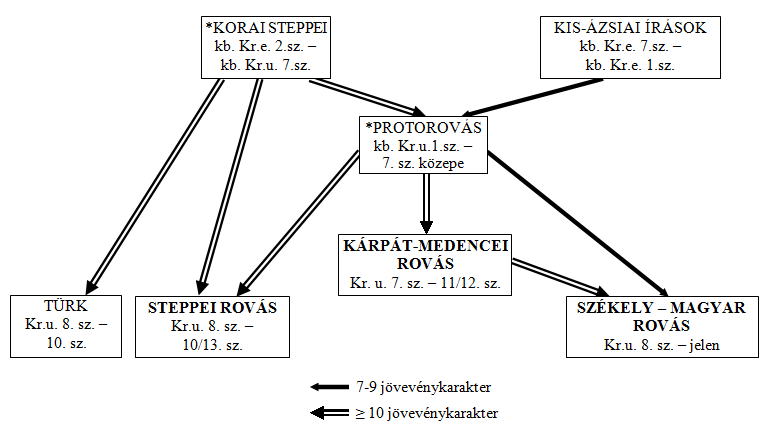 A rovásírások egyszerűsített családfája